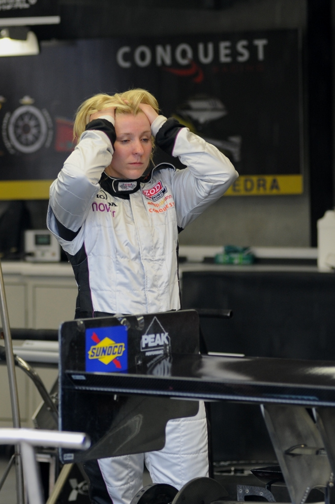 Pippa Mann